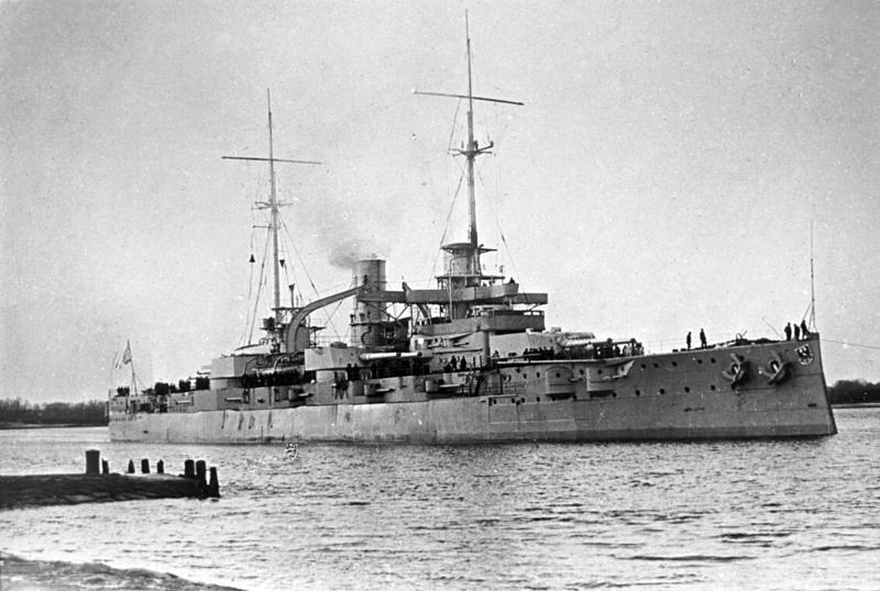 Linienschiff "SMS Rheinland" Linienschiff "S.M.S. Rheinland" der Nassau-Klasse, Ansicht der Steuerbord-Seite